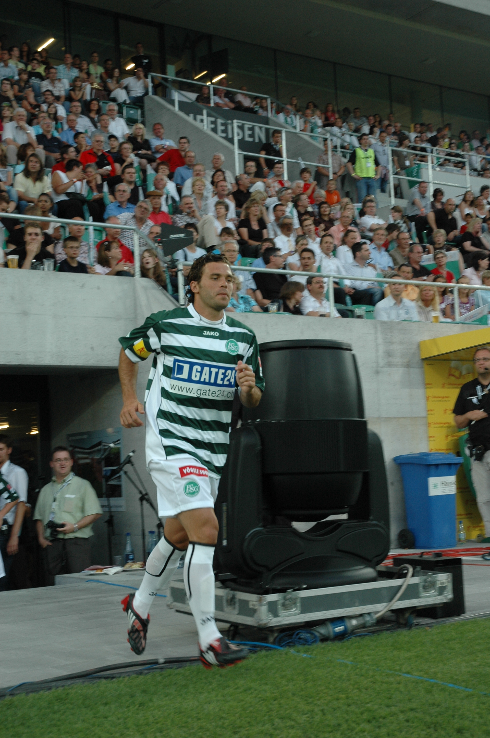 Zé Vitor bei der Eröffnung der AFG-Arena im Juni 2008.